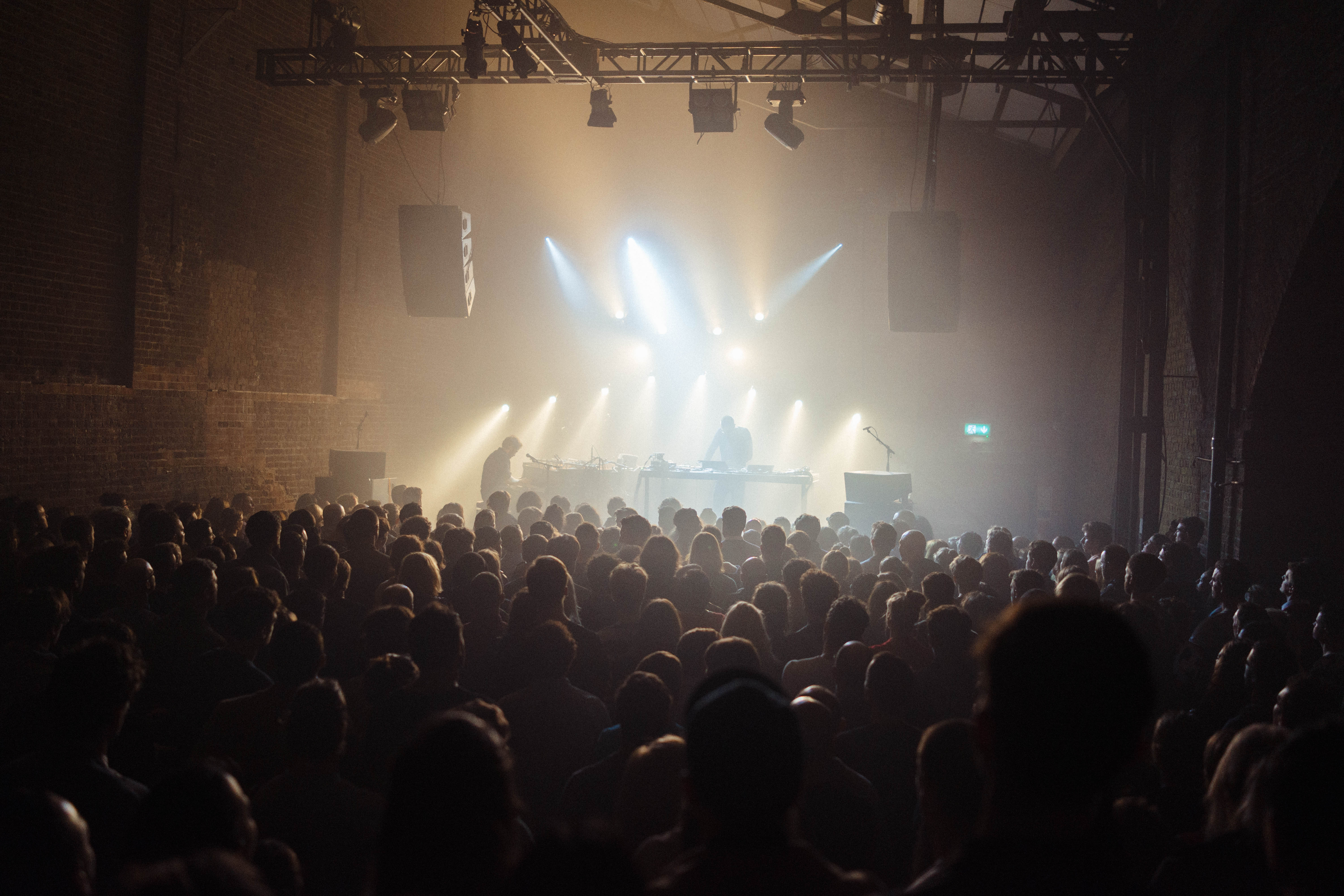 Grandbrothers bei einem Konzert im Londoner Live-Club Village Underground